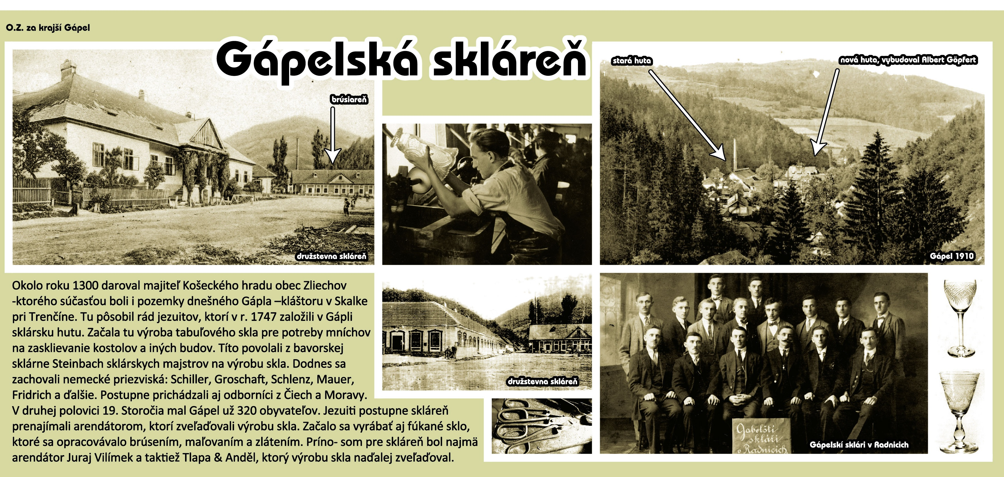 história miestnej sklárne